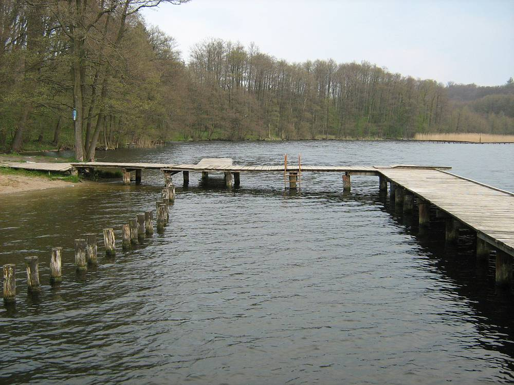 Jezioro Kamienica. Widok z kąpieliska w kierunku południowym.